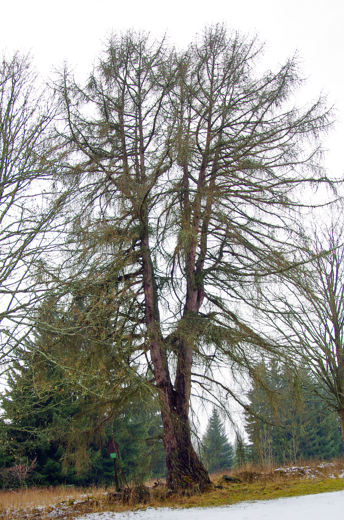 památný strom - Modřín v Horní Oboře u Šindelové, okres Sokolov